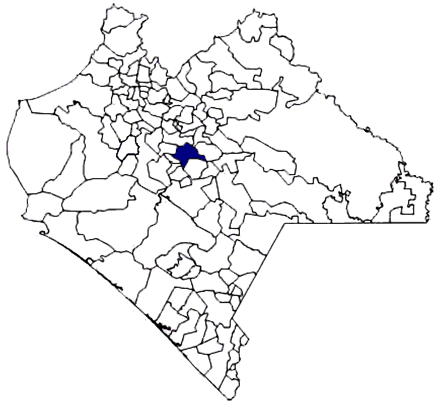 Yo hice esta imagen basado en otra imagen que habia hecho yo y que doné a wikicommons.